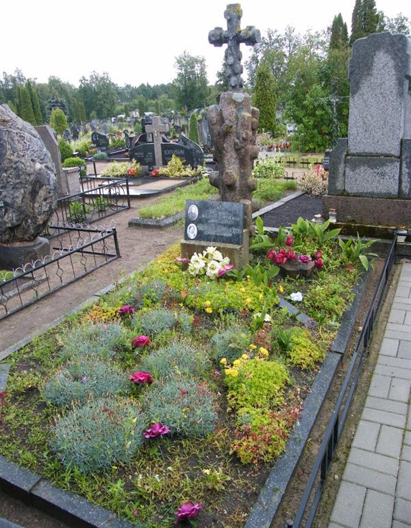 Kazio Buroko kapas Kupiškio miesto kapinėse